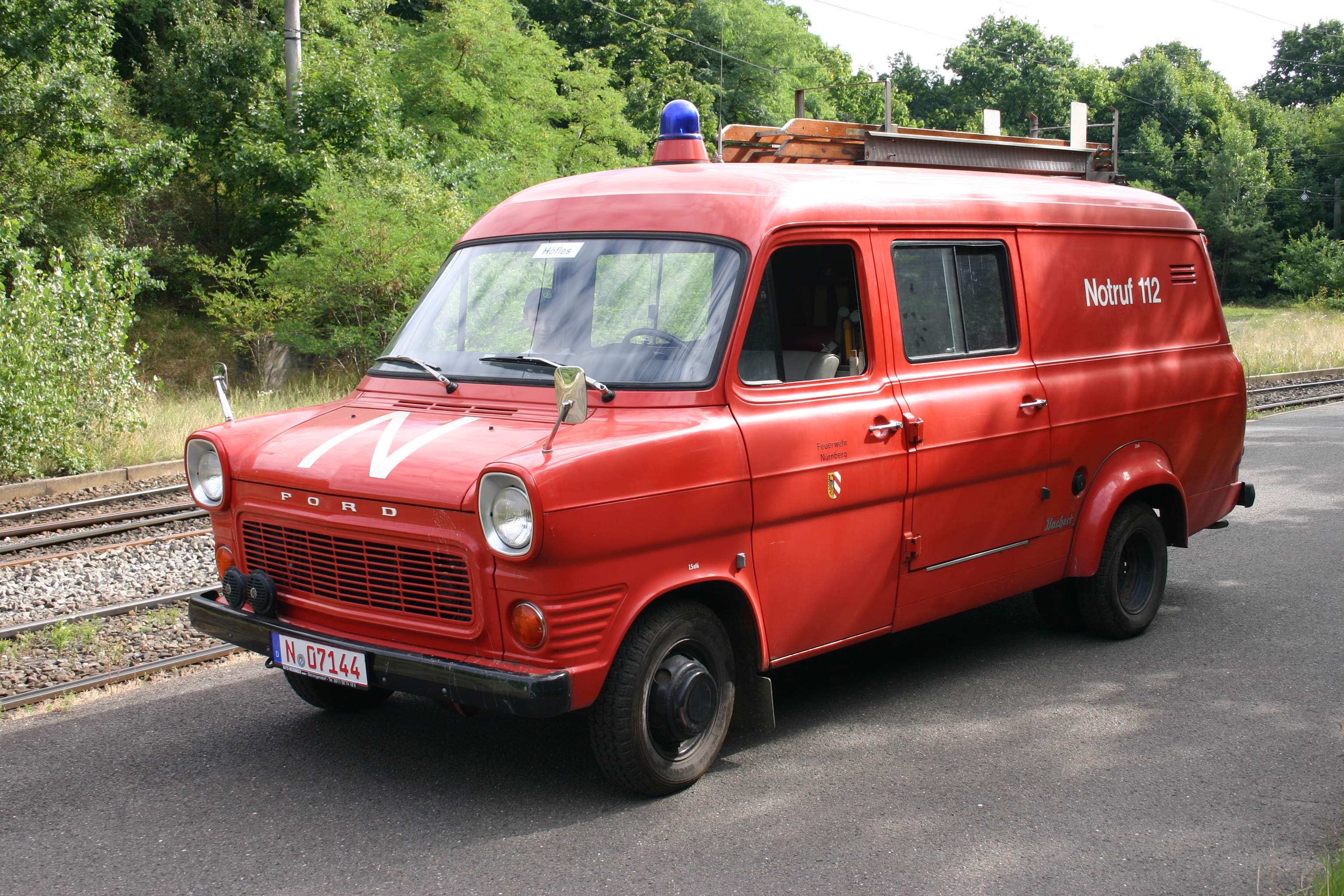 Tragkraftspritzenfahrzeug TLF 8 (ehemals FFW Höfles)